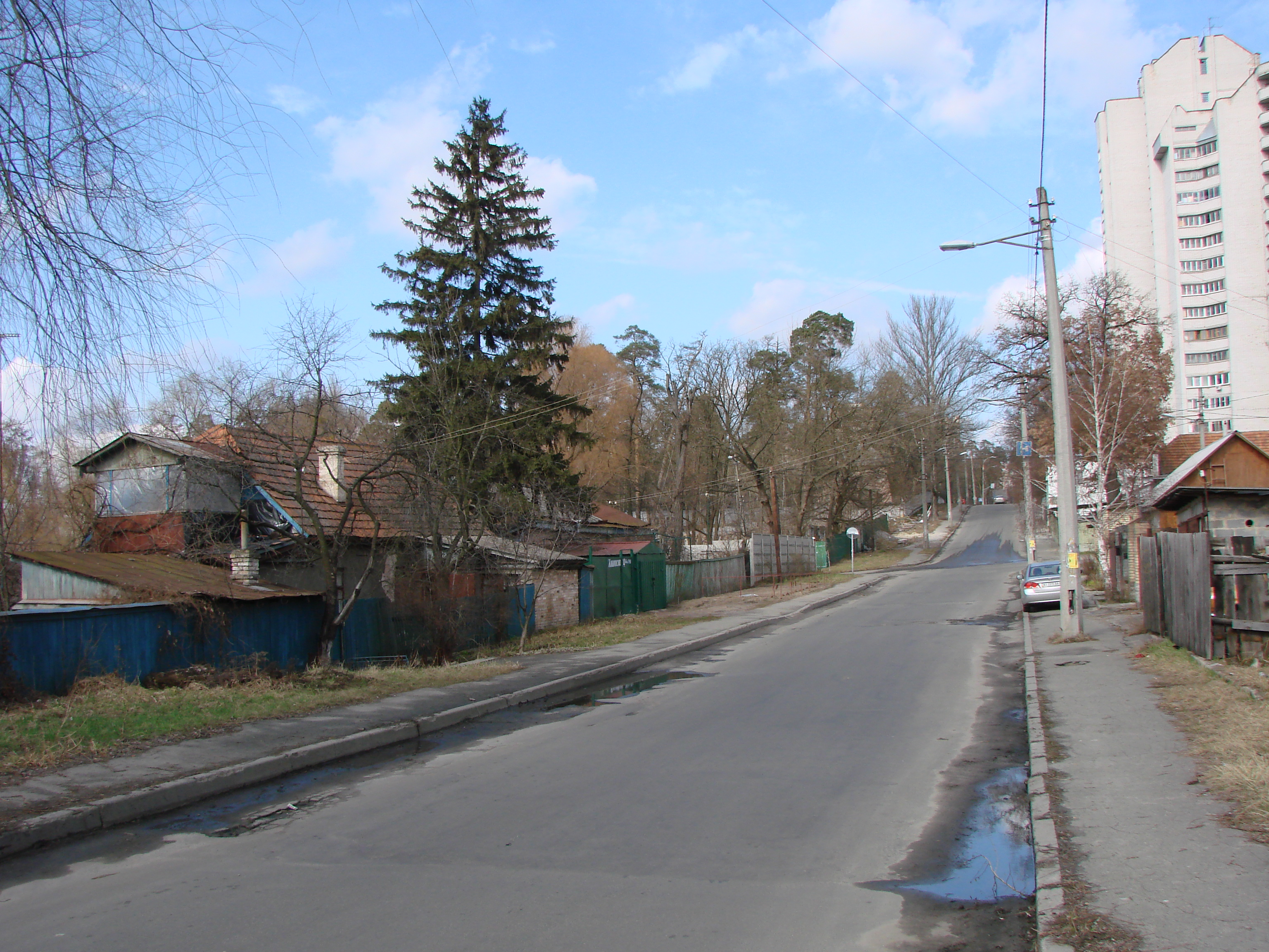 Живописна вулиця у Києві